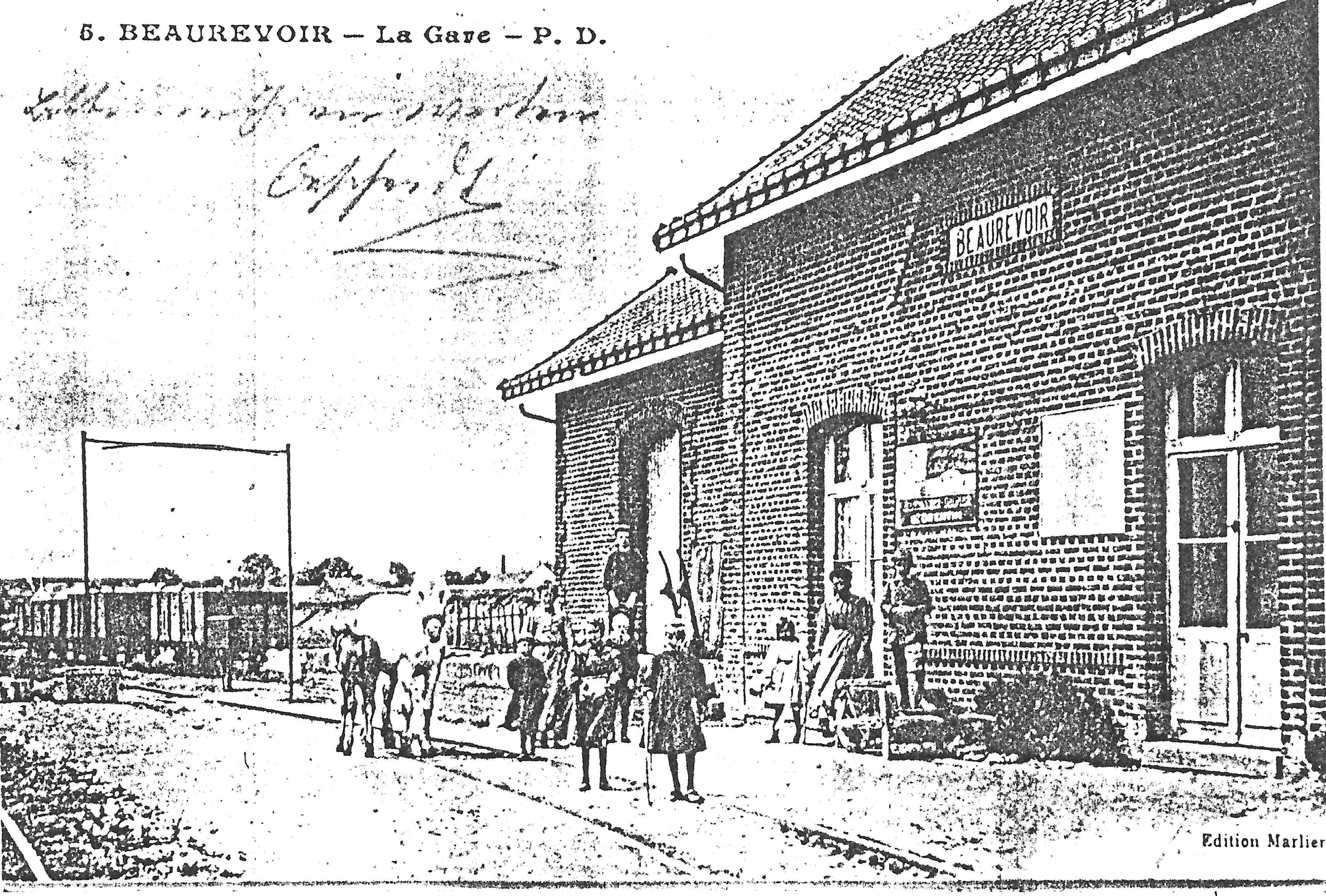 La gare de Beaurevoir vers 1910.